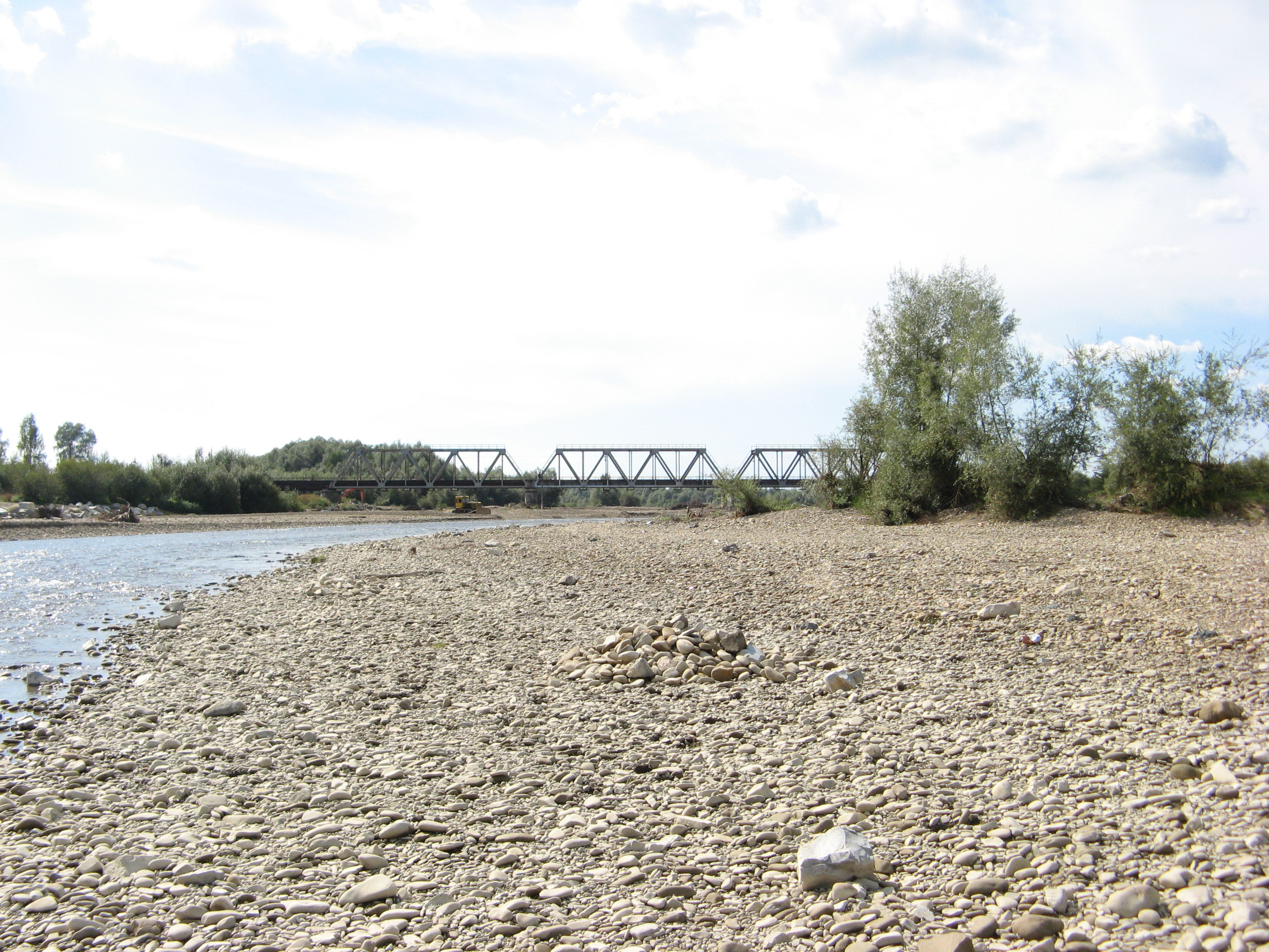 Русловий алювій Бистриці-Надвірнянської на південно-східній околиці Івано-Франківська